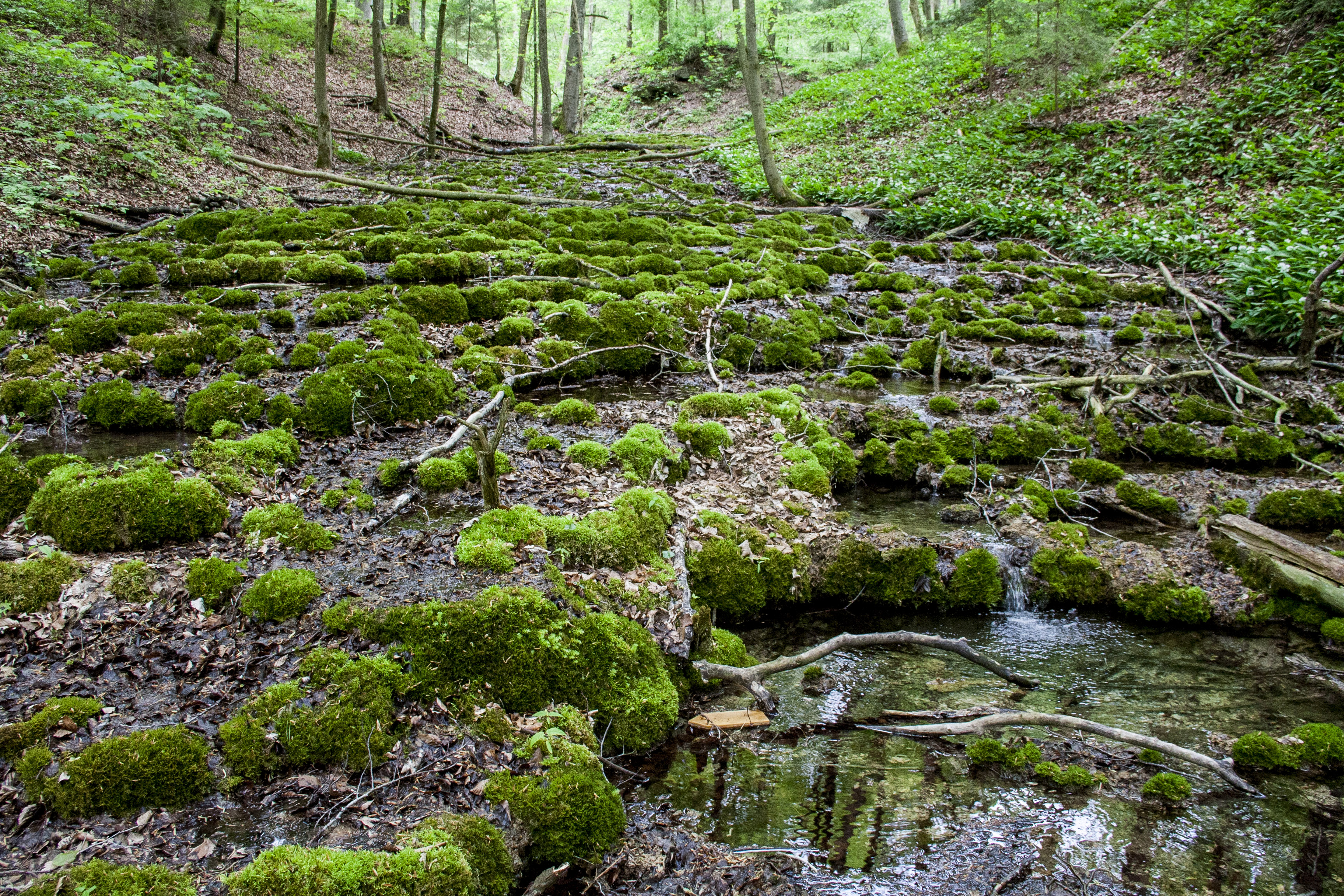 Sinterterrassen, Untermässing, Geschützter Landschaftsbestandteil, Greding, Geotop, Naturpark Altmühltal